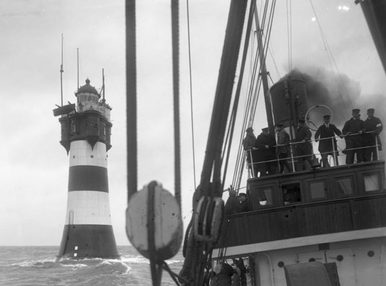 Gefahrvolle Ablösung und Verproviantierung der Leuchtturmwächter am "Roter-Sand" in der Nordsee an der Wesermündung bei Bremerhaven! Das Schiff mit der Ablösungsmannschaft nähert sich dem mitten im Meere stehenden "Roter-Sand"-Leuchtturm.